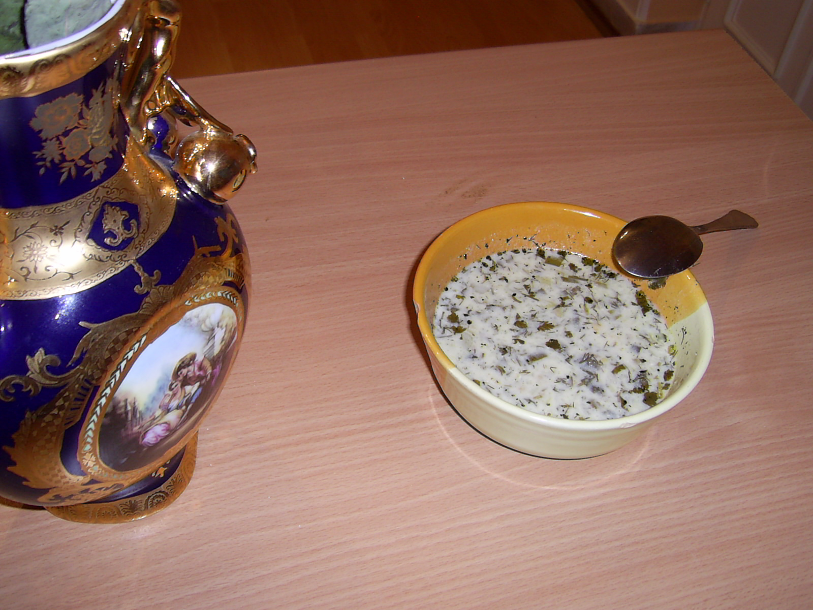 Aush